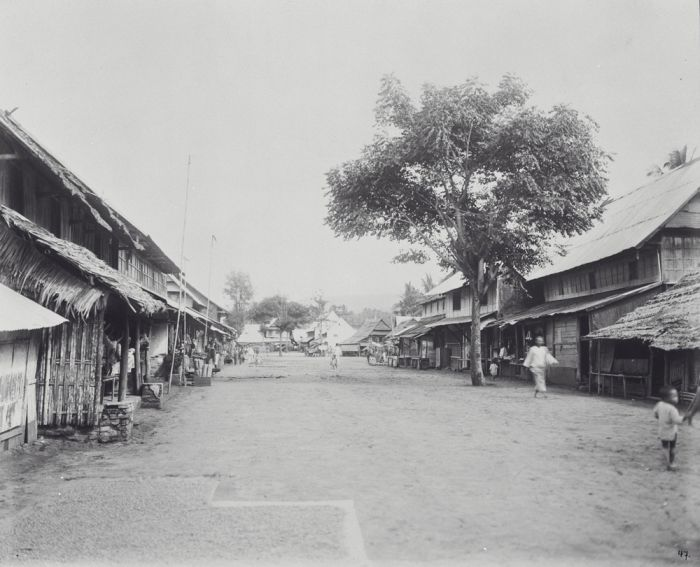 Foto. Een straat in Bonthain in Makassar op Celebes